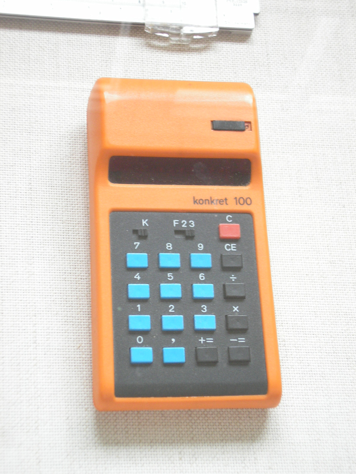 Ein DDR-Taschenrechner aus Mühlhäuser Produktion im Stadtmuseum von Bad Langensalza (Thüringen)